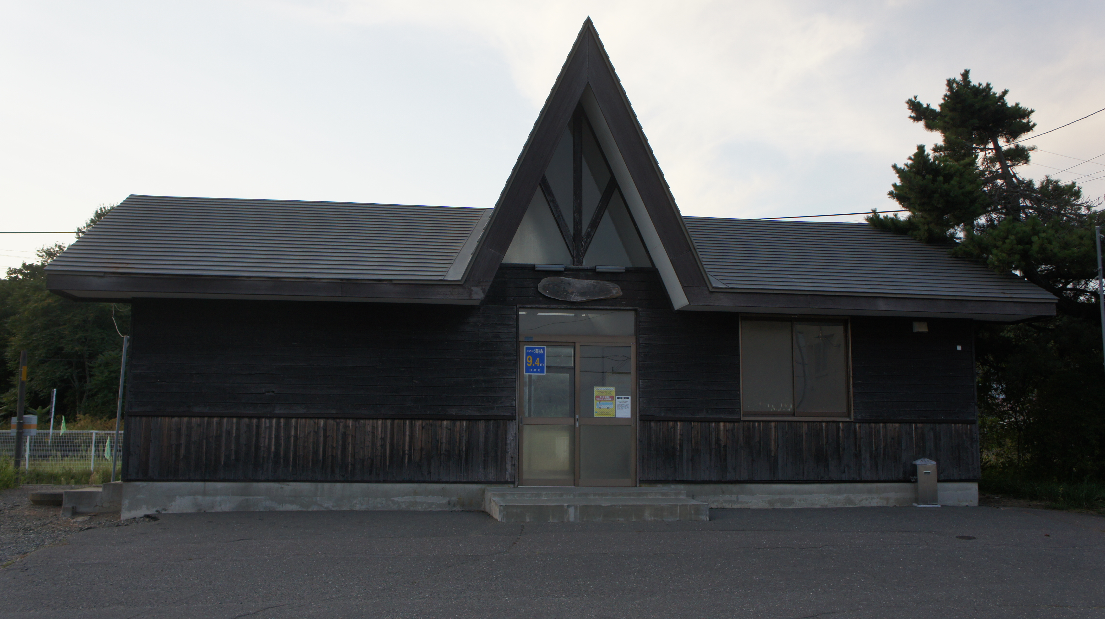 JR日高本線・富川駅の駅舎